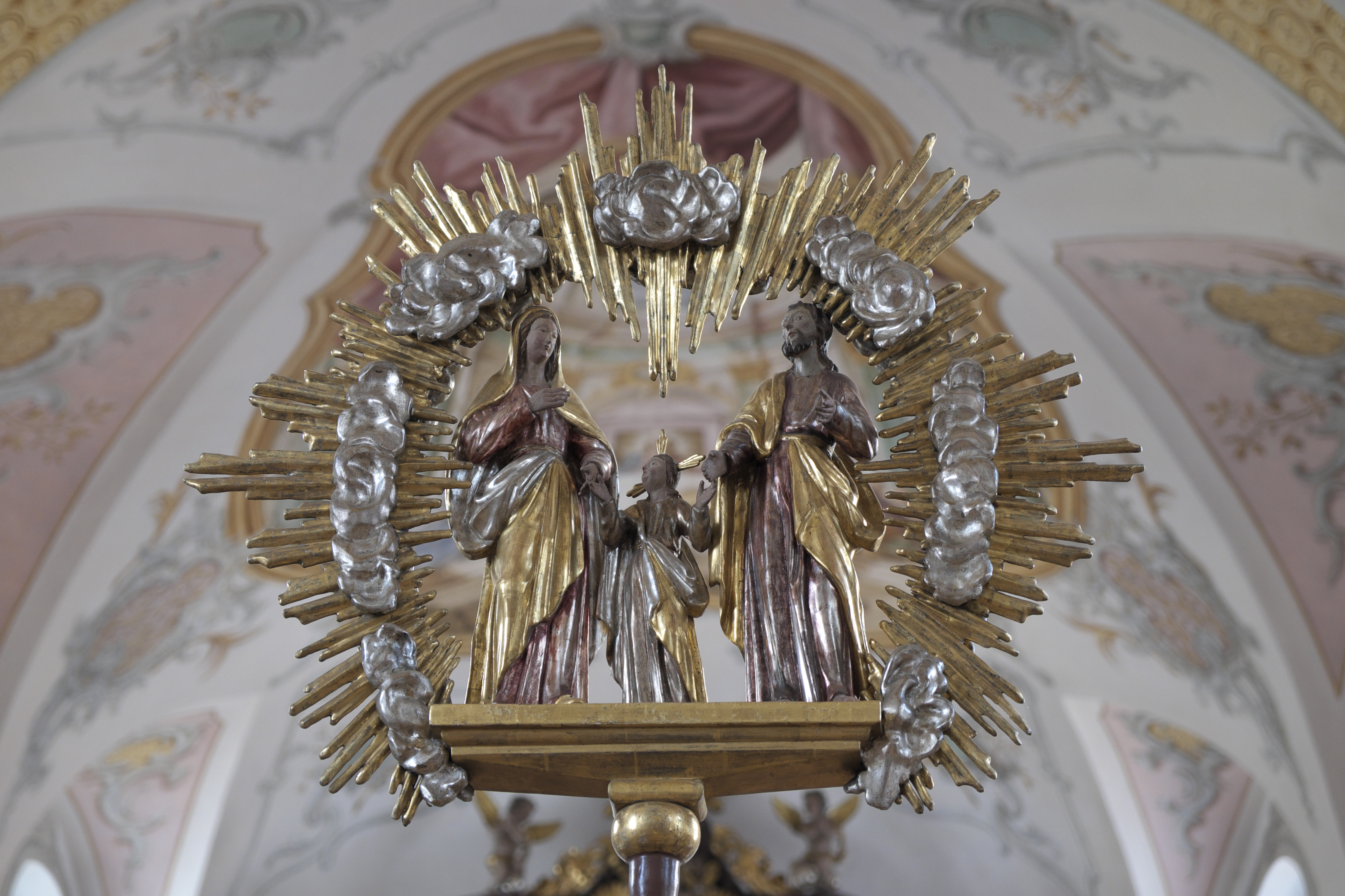 Katholische Pfarrkirche Heilig Kreuz in Schwabhausen bei Landsberg, einem Ortsteil von Weil (Oberbayern) im Landkreis Landsberg am Lech (Bayern/Deutschland), Bruderschaftsstange mit Skulpturen der Heiligen Familie